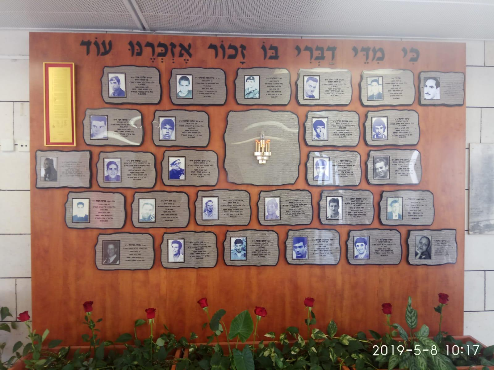 לוח נופלים בית ספרי